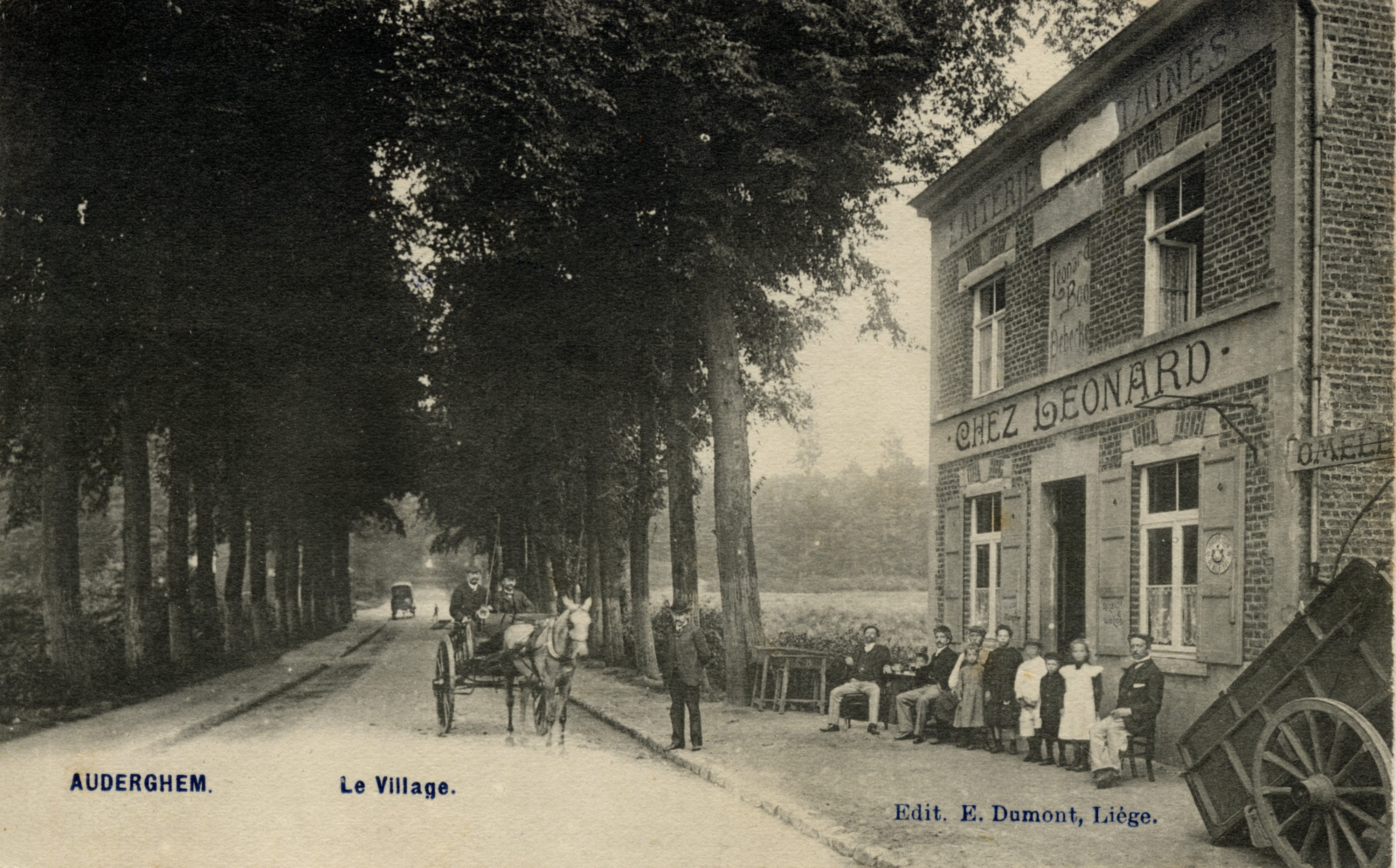 Auderghem,L'auberge Chez Léonard.Elle a donné son nom au carrefour sur le ring de Bruxelles